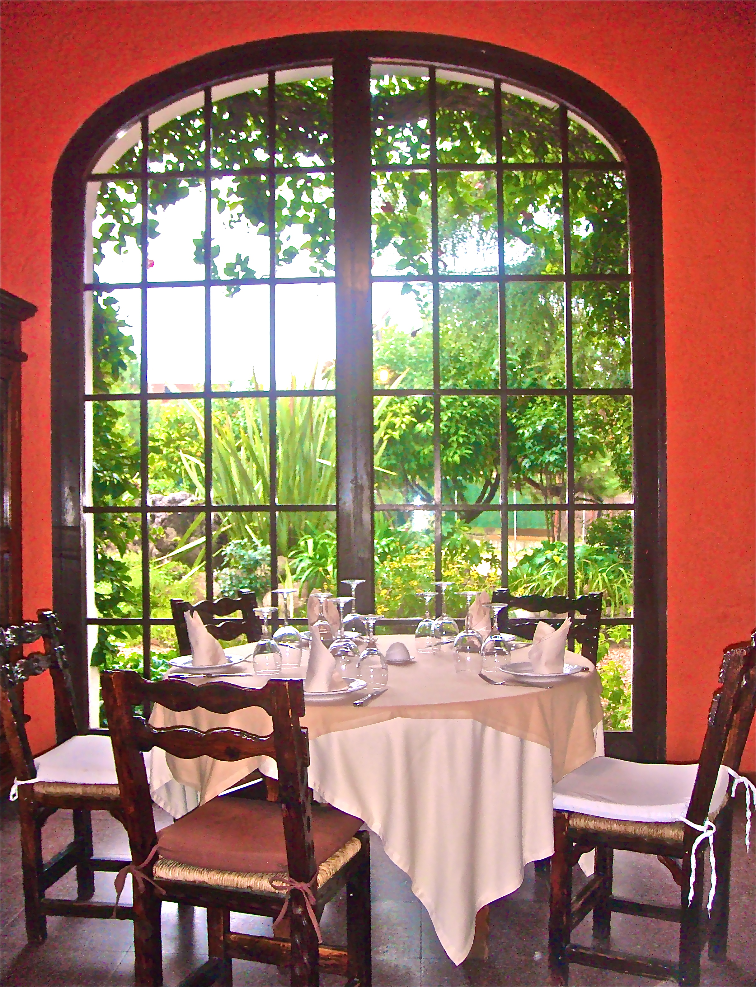 Taula amb vistes al jardi